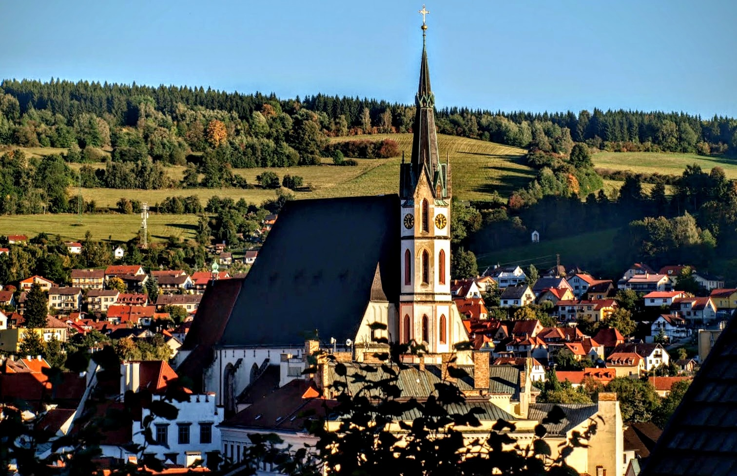 Český Krumlov, kostel sv. Víta